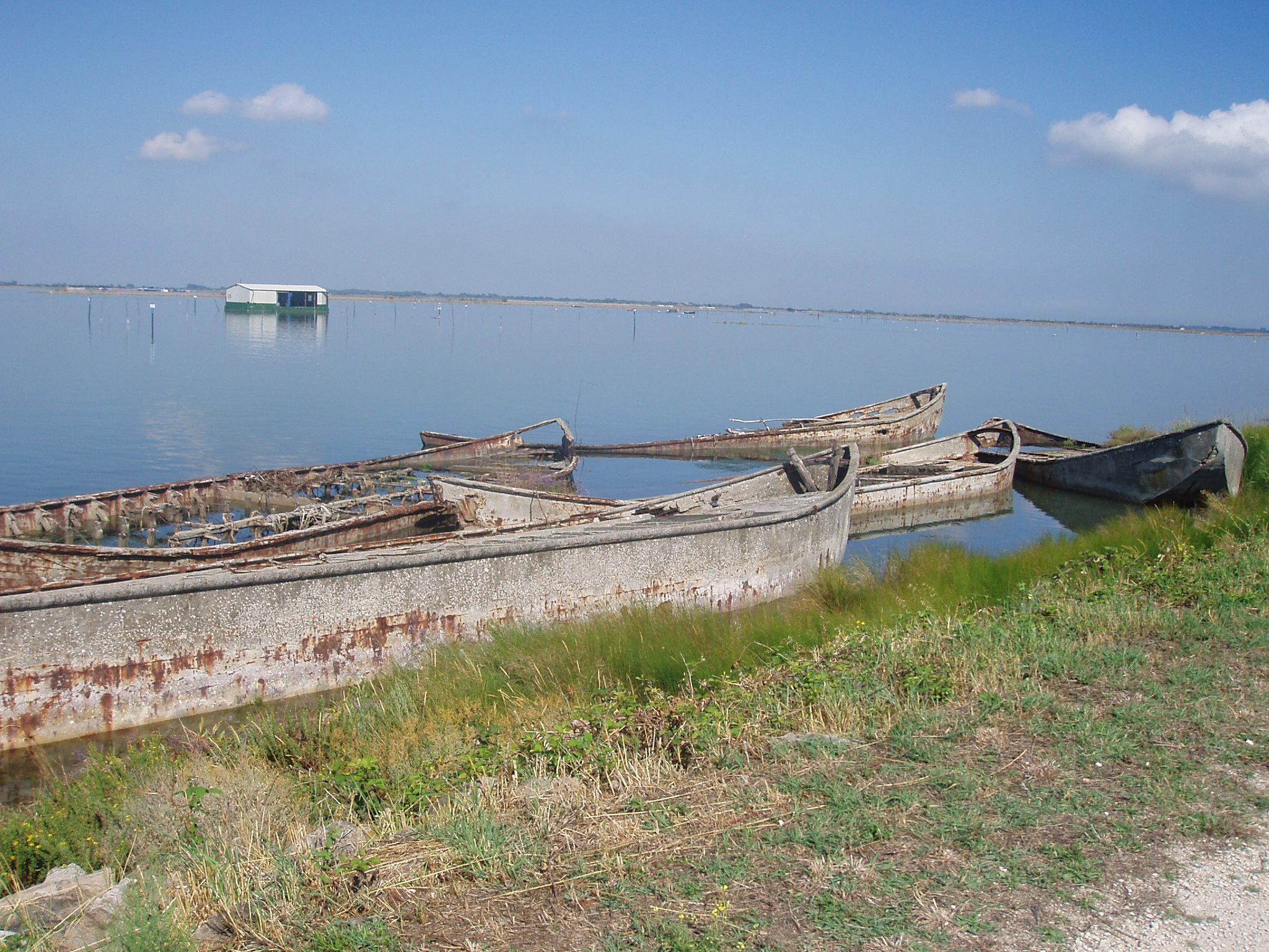 Albarella